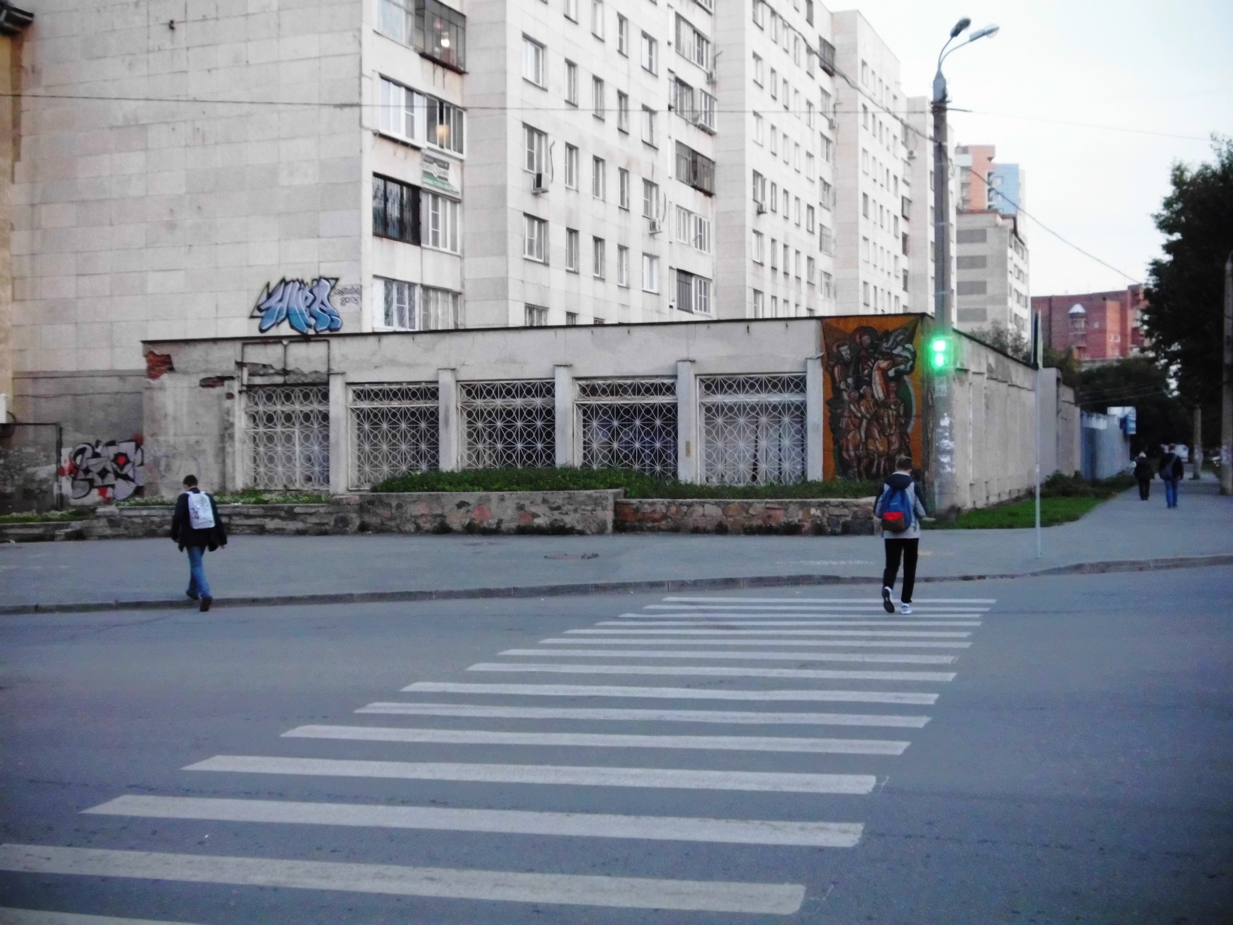 Библиотека № 15 башкирской и татарской литературы имени Шайхзады Бабича в городе Челябинске. Пристрой жилого дома на ул. Цвиллинга, 61. Вид со стороны ул. Евтеева (дома ул. Цвиллинга 59А), левый фасад здания. Также, в этой части здания располагается отдел иностранной литературы Челябинской областной универсальной научной библиотеки.